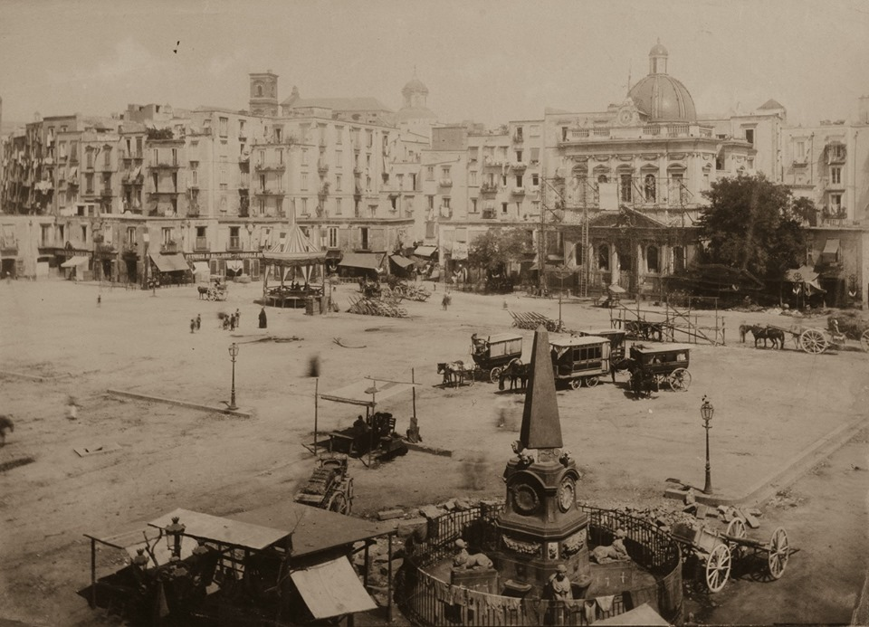 Napoli, Piazza Mercato con fontana ad obelisco. Foto di autore sconosciuto.